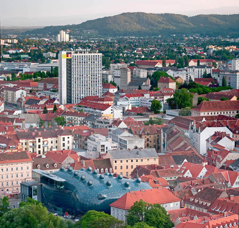 Kunsthaus Graz, Blick vom Schlossberg